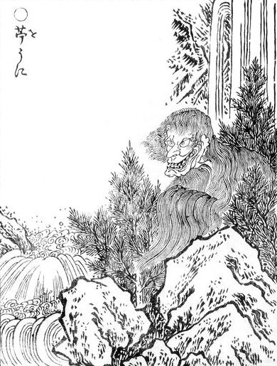 Ouni (苧うに) from the Gazu Hyakki Yakō (画図百鬼夜行)